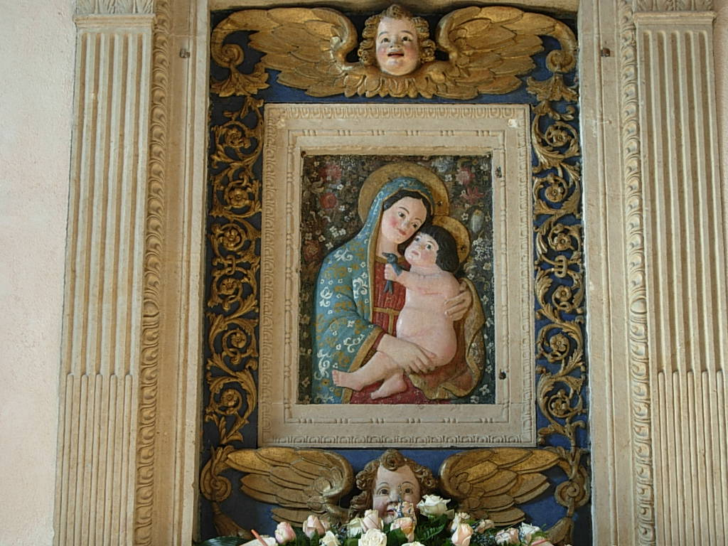 Effige della Madonna della Portella in Rivisondoli (AQ) Foto personale concessa in PD